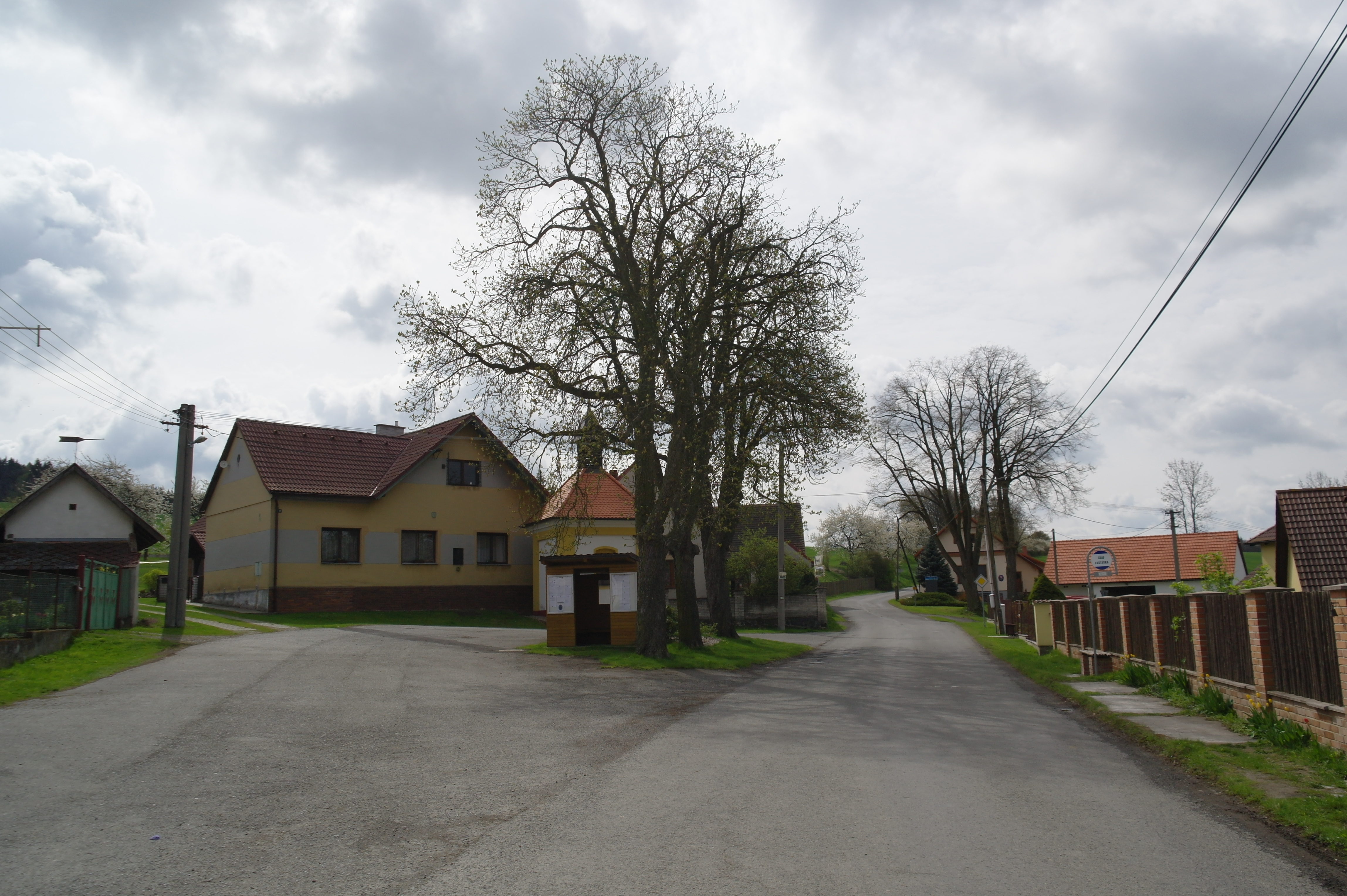 Vlčí